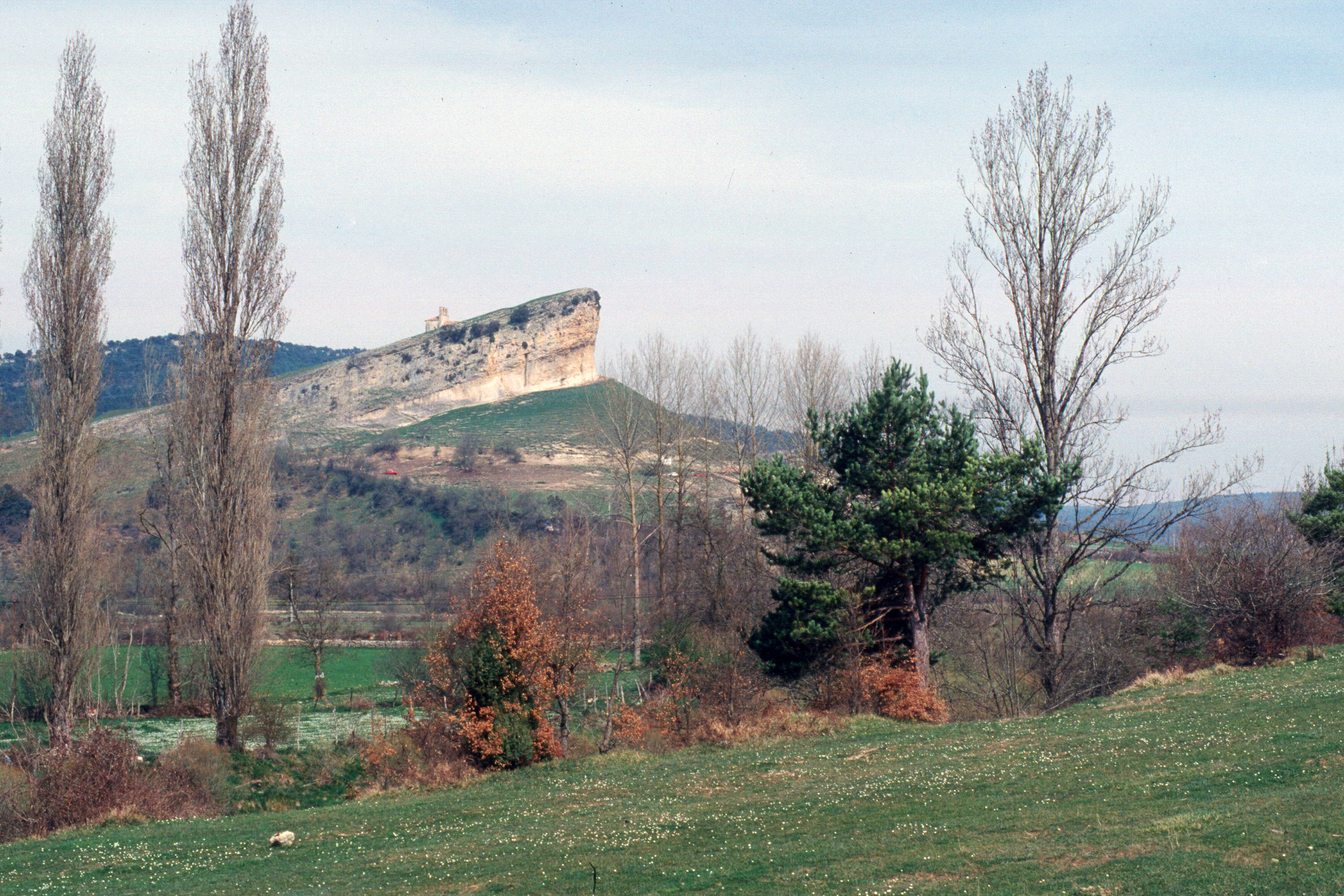 Iglesia de San Pantaleón en la Peña Colorada, San Pantaleón de Losa, Burgos, España.